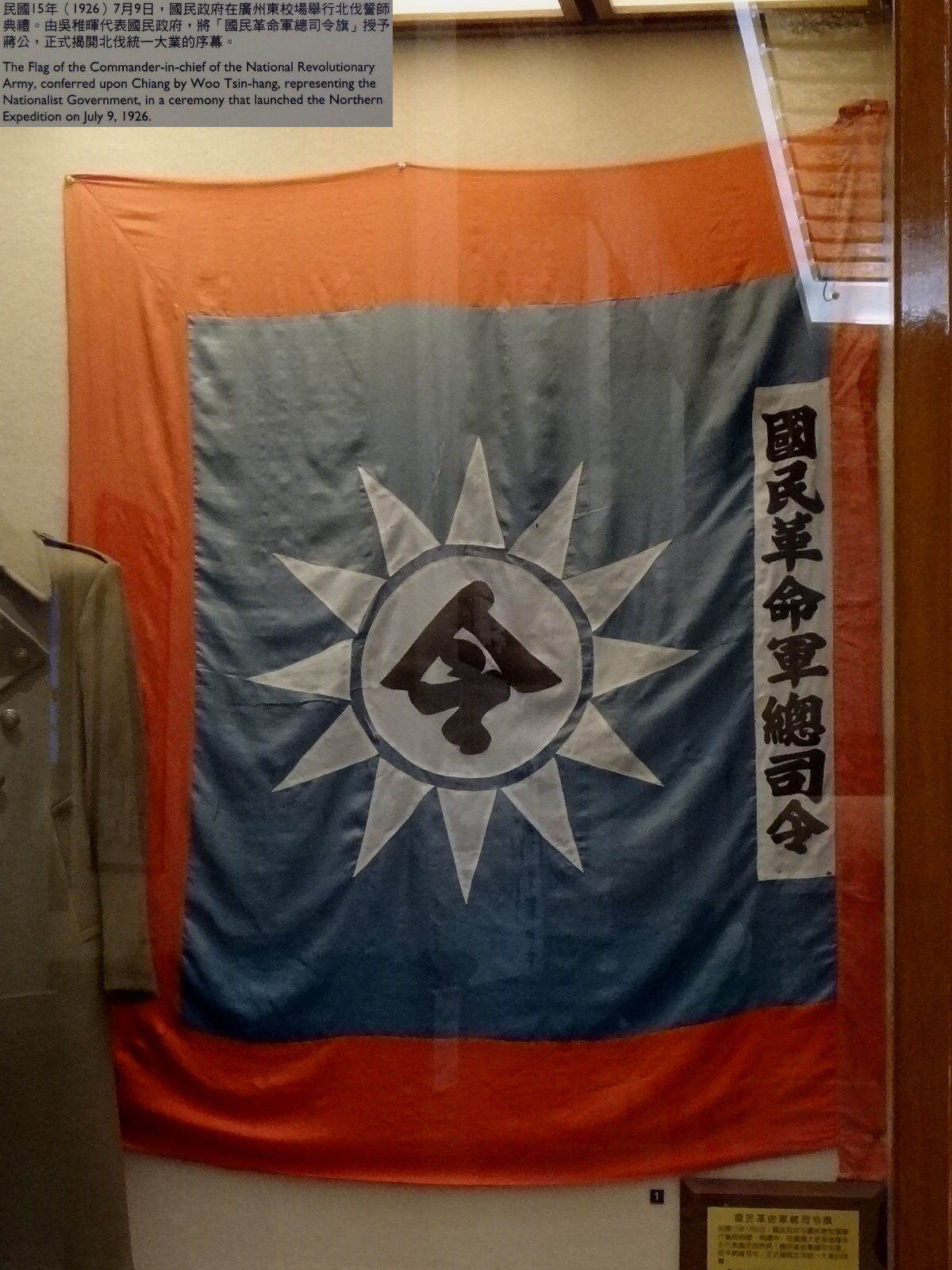 國立中正紀念堂展示的國民革命軍總司令旗。